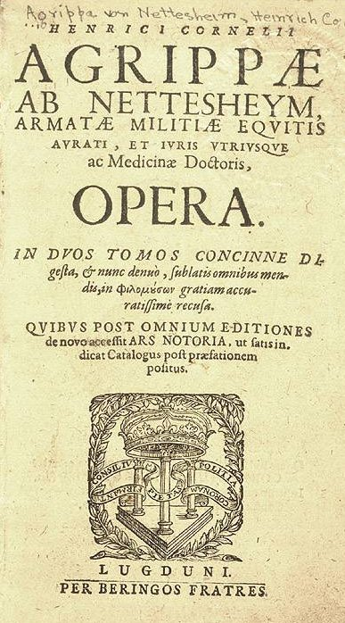 Title page Opera omnia, in duos tomos concinne digesta, & nunc denuò sublatis omnibus mendis